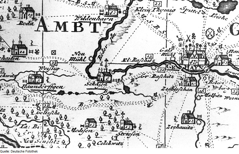 Original image description from the Deutsche Fotothek Großenhain-Skassa. Karte des Amtes Großenhain, von Zürner, 1711, Nachträge 1730 (Sign.: VII 108)